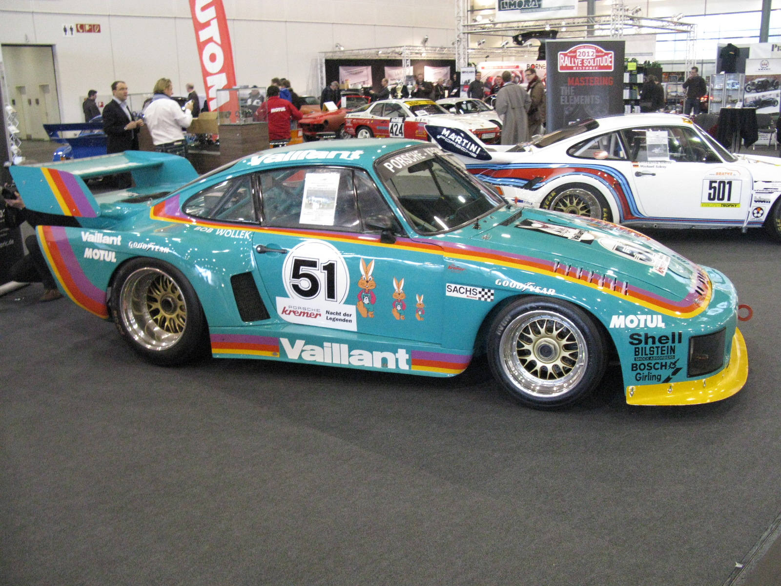 Porsche 935 Turbo K2 Kremer Racing